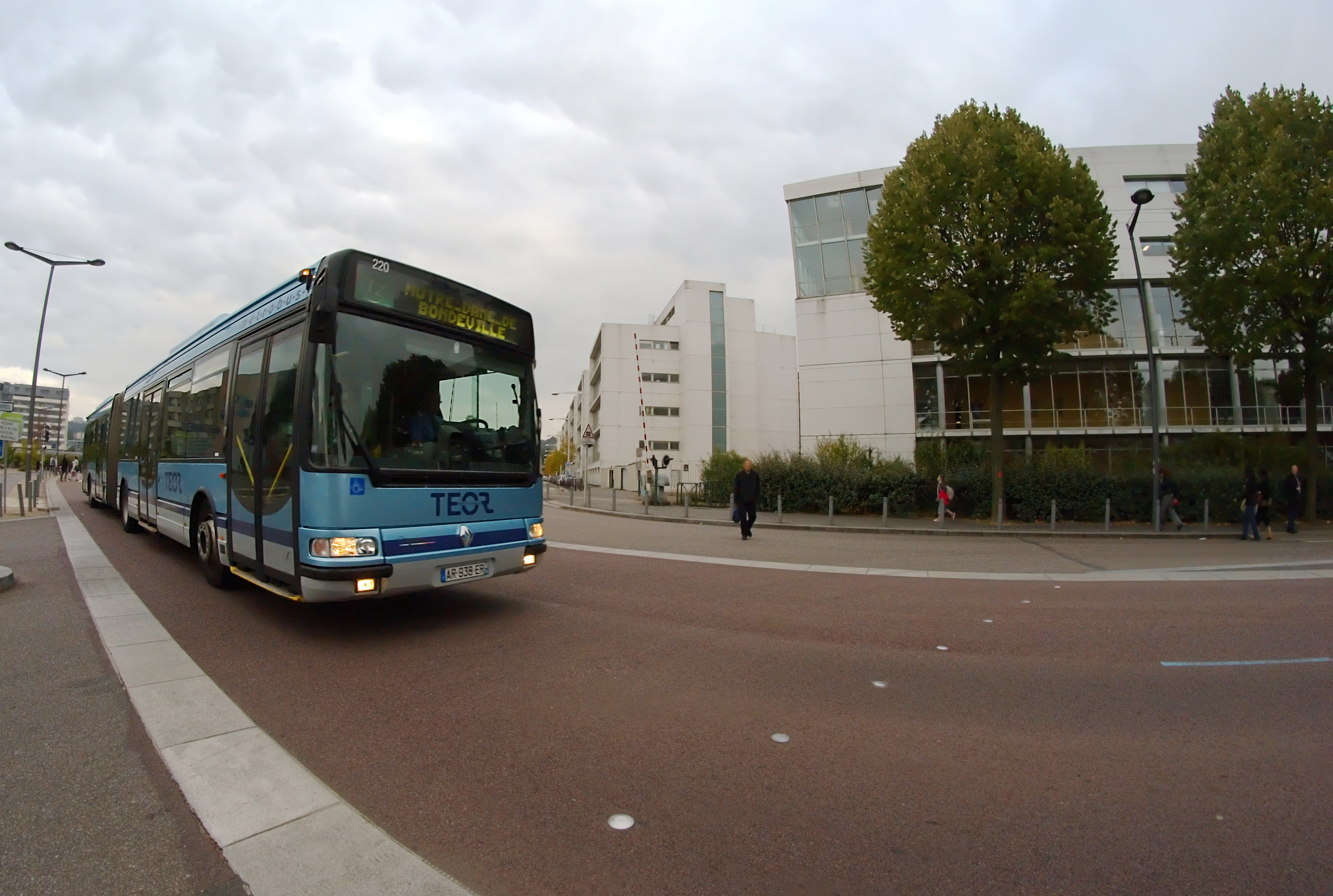 Renault Agora L, Bus Teor de la TCAR à Rouen sur le boulevard Gambetta